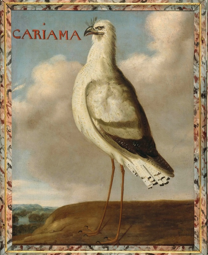 Hoflößnitz, Eckhout: Bild 43: Cariama